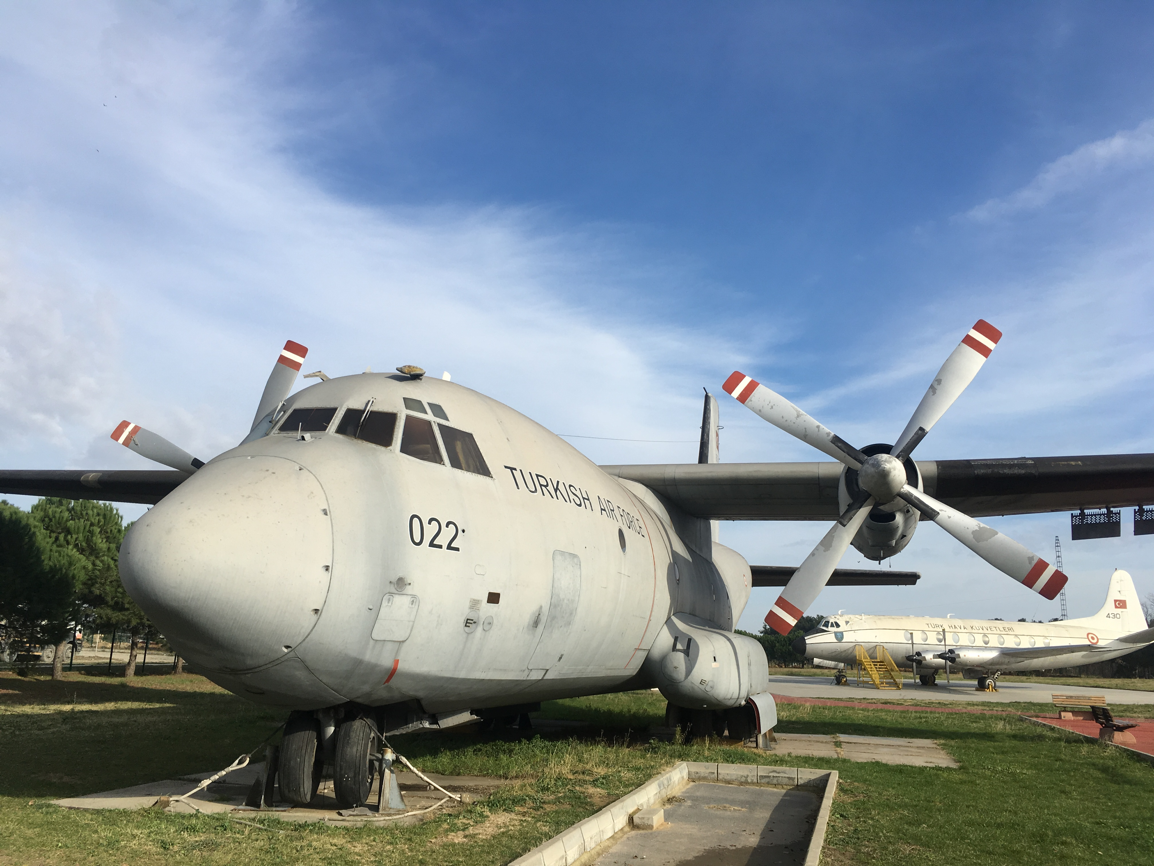 C-160 Transall à Istanbul